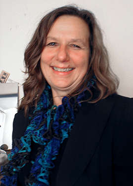 Claudia Villiger ist Professorin an der Fachhochschule Hannover, an der Fakultät I, Fachbereich Elektro- und Informationstechnik lehrt sie Linguistik und Textproduktion. Im Wintersemester 2012 unterrichtet sie unter der Überschrift "Kommt mit ins Erklärbüro!" an der KinderUni Hannover ...